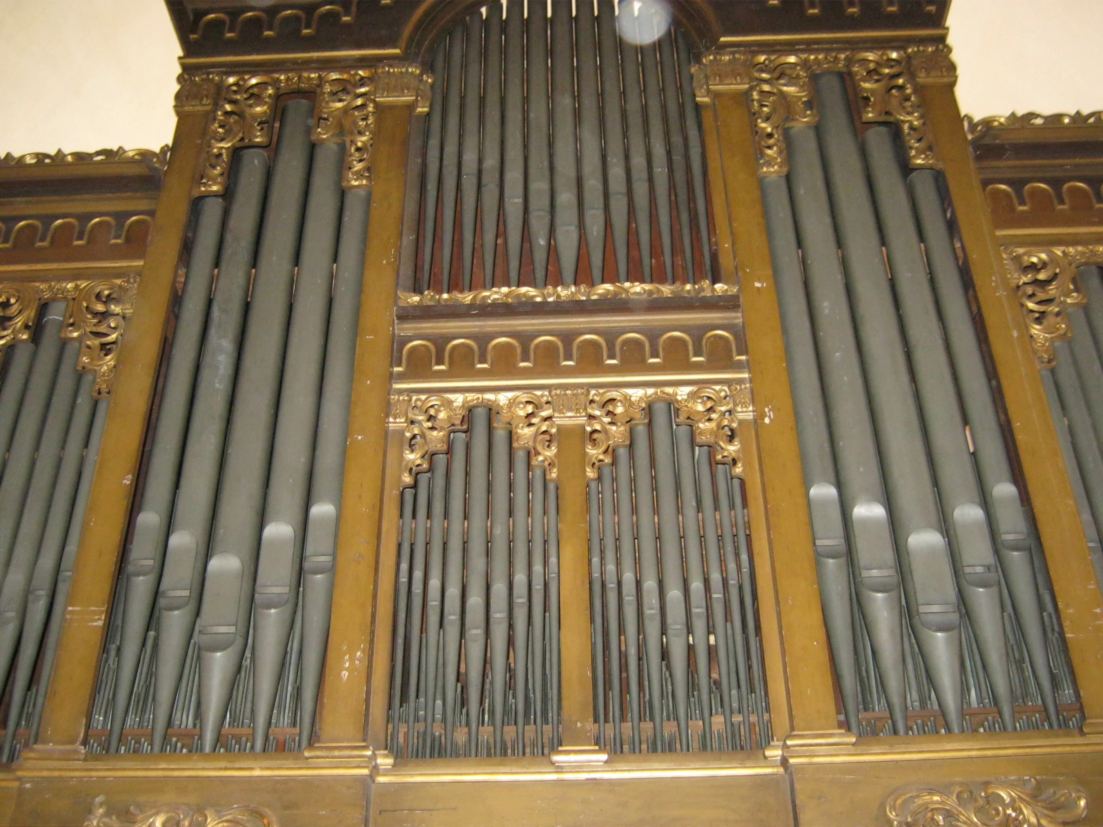 Prospekt varhan sv. Václava a Blažeje